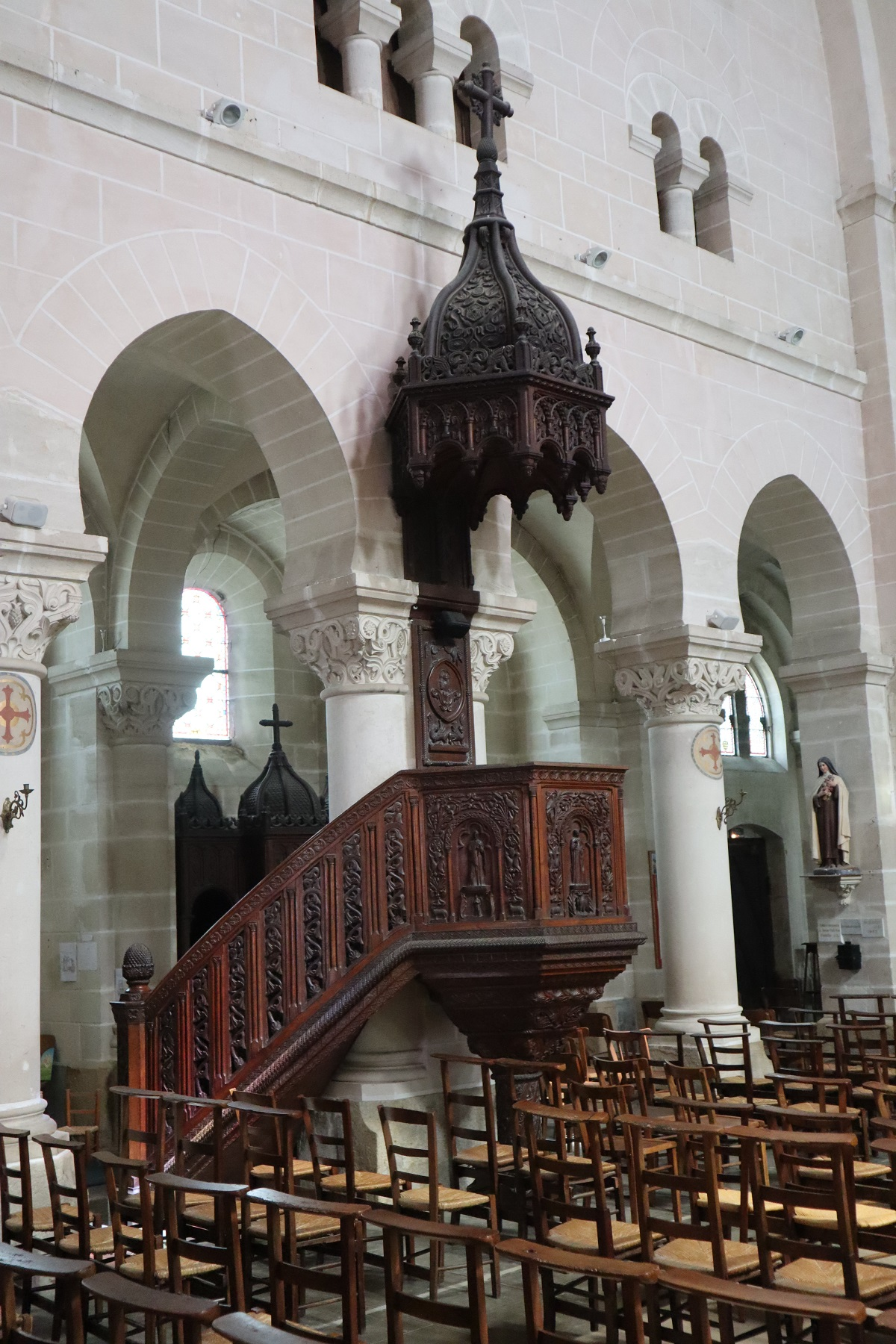 Intérieur de l'église Saint-Maximilien-Kolbe de Corps-Nuds (35). Chaire.